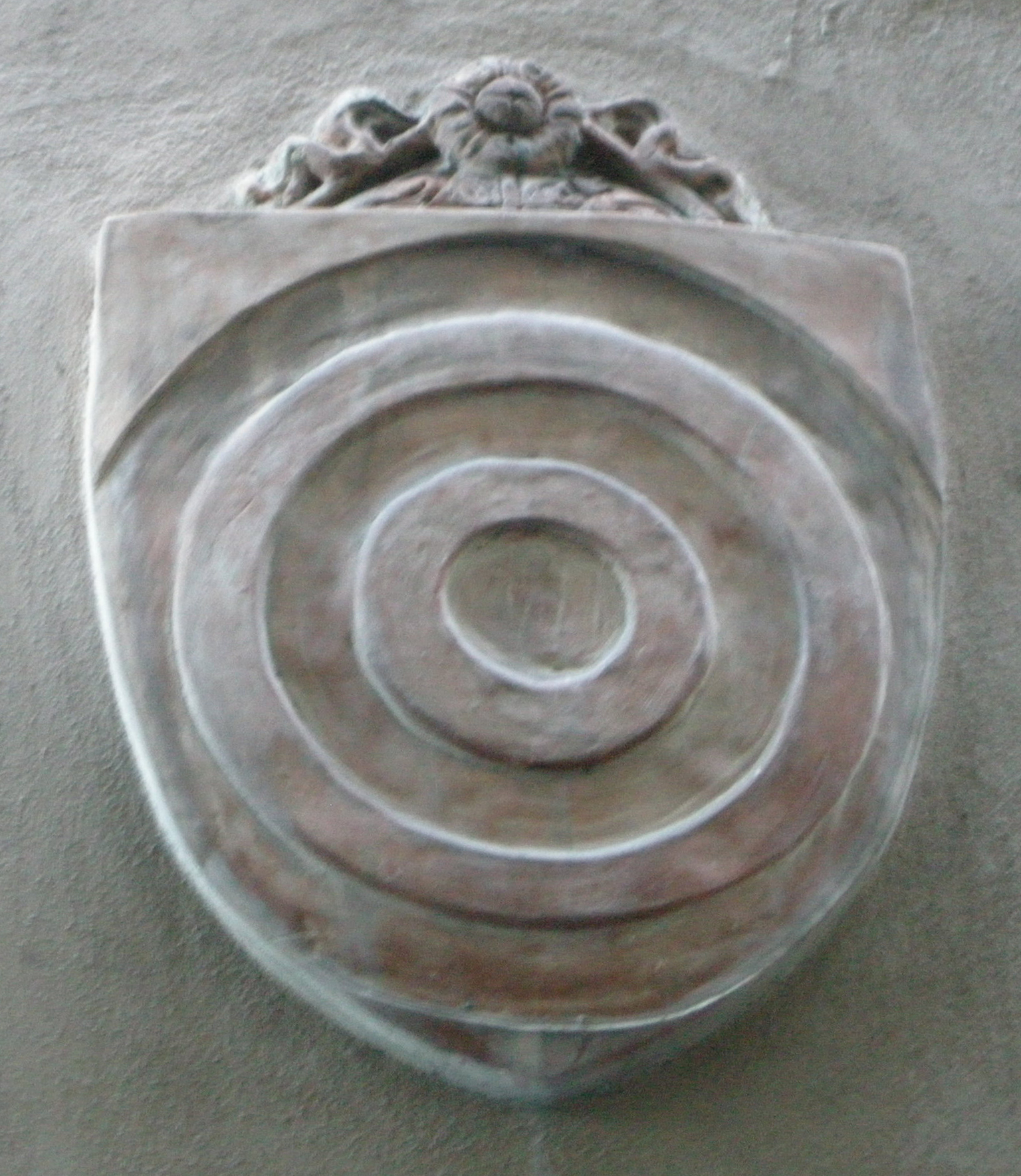 Torre dei lanfredini